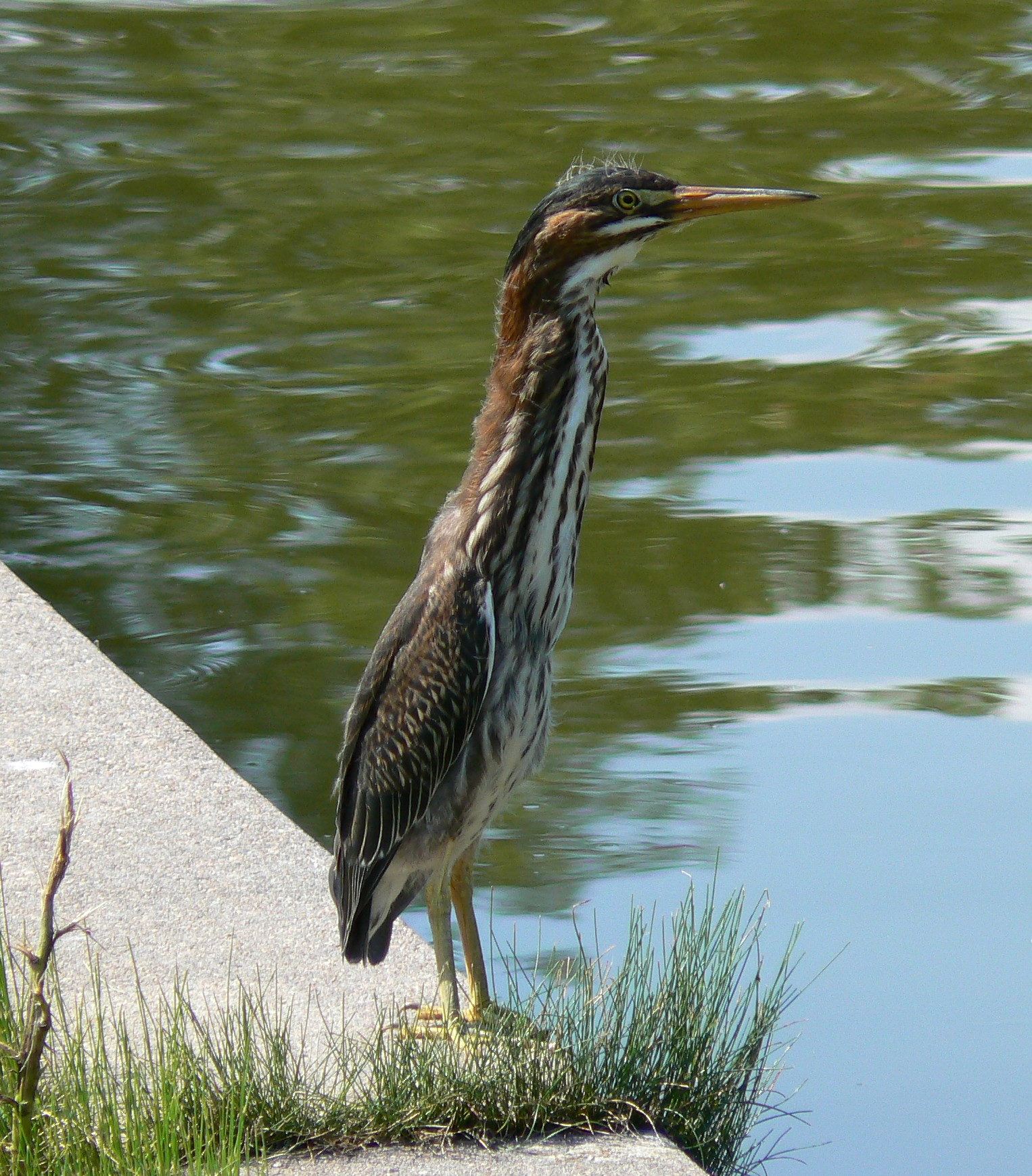 Butorides virescens Green Heron